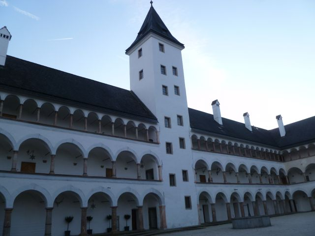 Schloss Parz - Innenhof